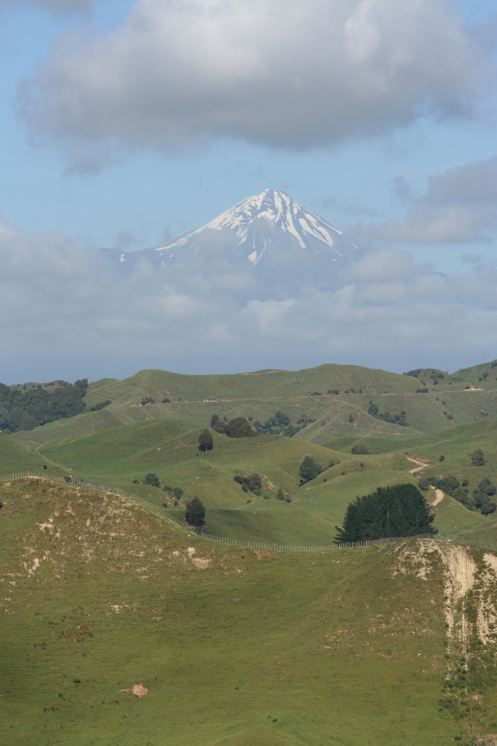 Mount Taranaki Ansicht vom Forgotten World Highway